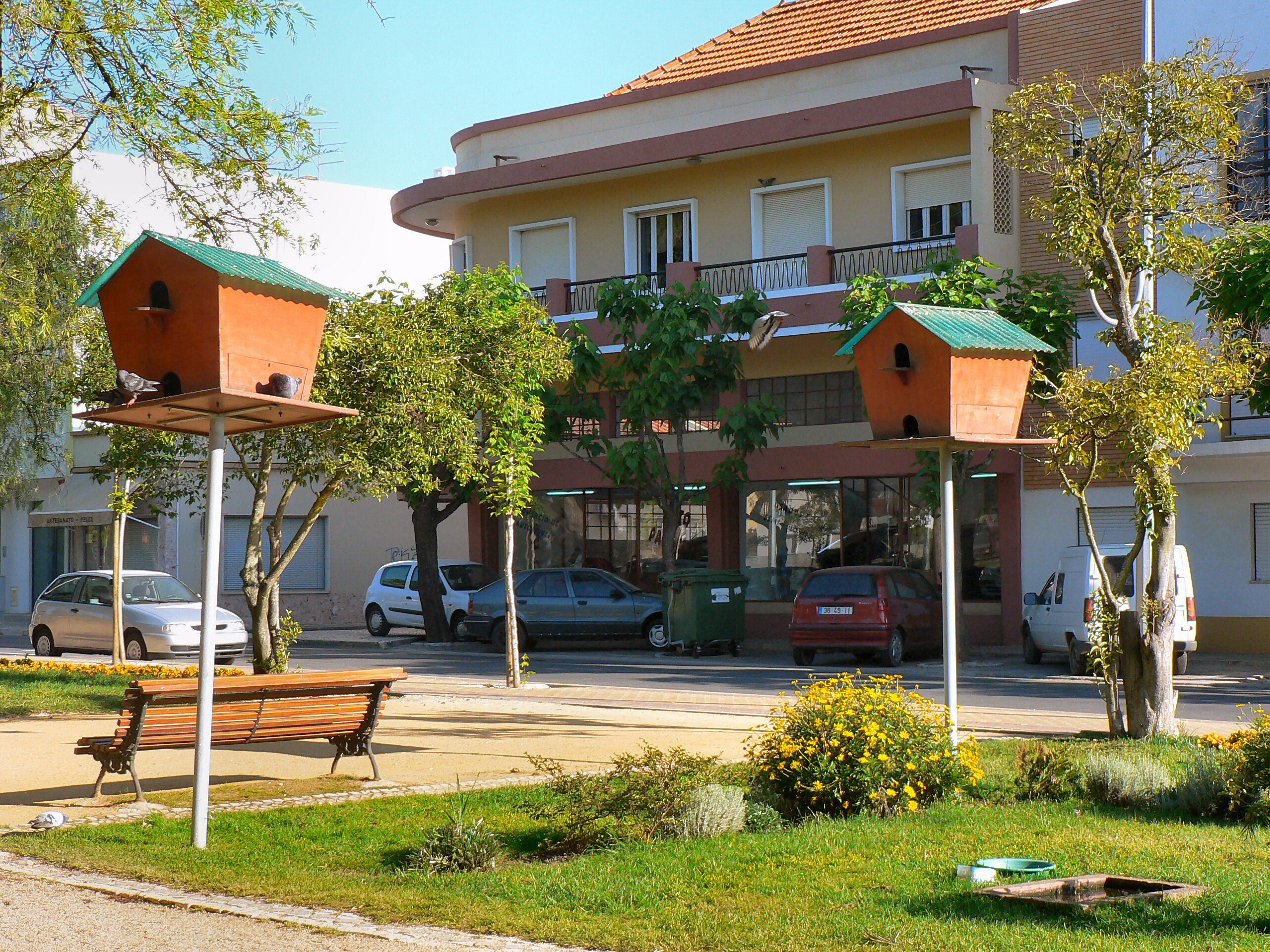 Centro Desportivo Municipal José Afonso em Grandola